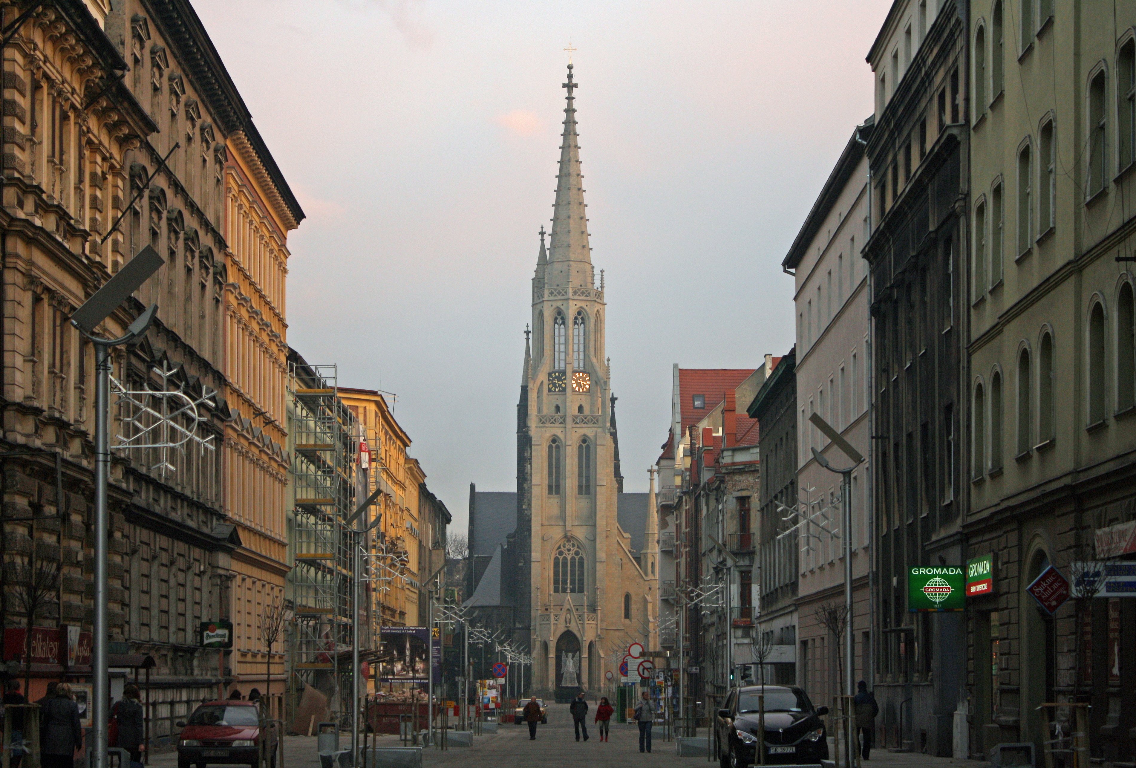 Katowice - ul. Mariacka o zmierzchu. Na wprost neogotycki kościół NMP